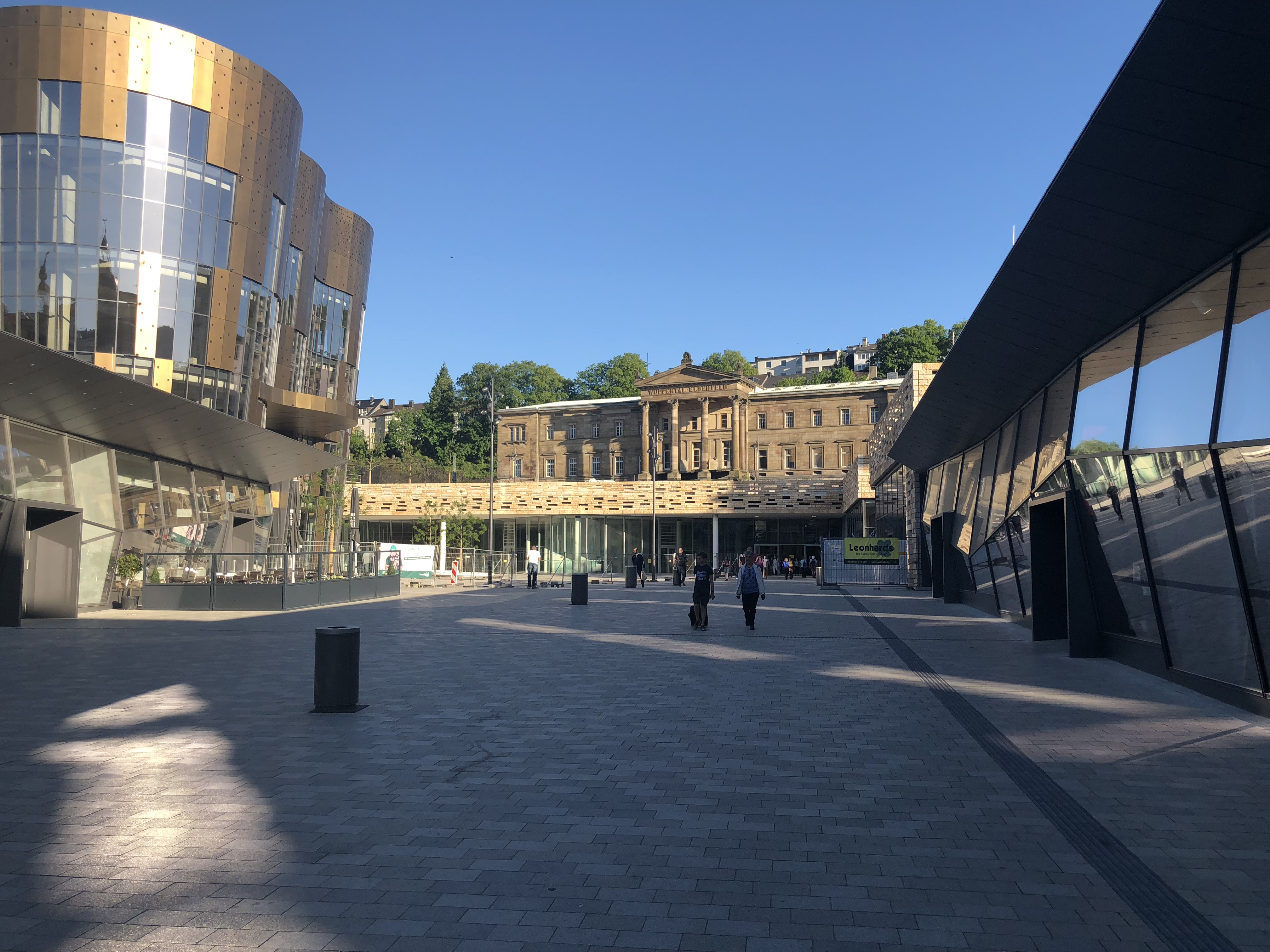 Döppersberg, Wuppertal